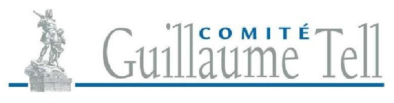 Logo du Comité Guillaume Tell